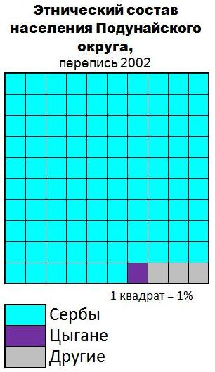 Этнический состав населения Подунайского округа (Сербия)